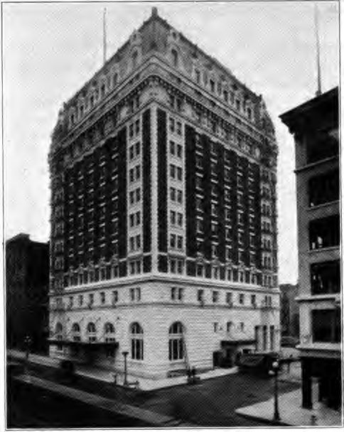 Benson Hotel in Portland, Oregon circa 1920